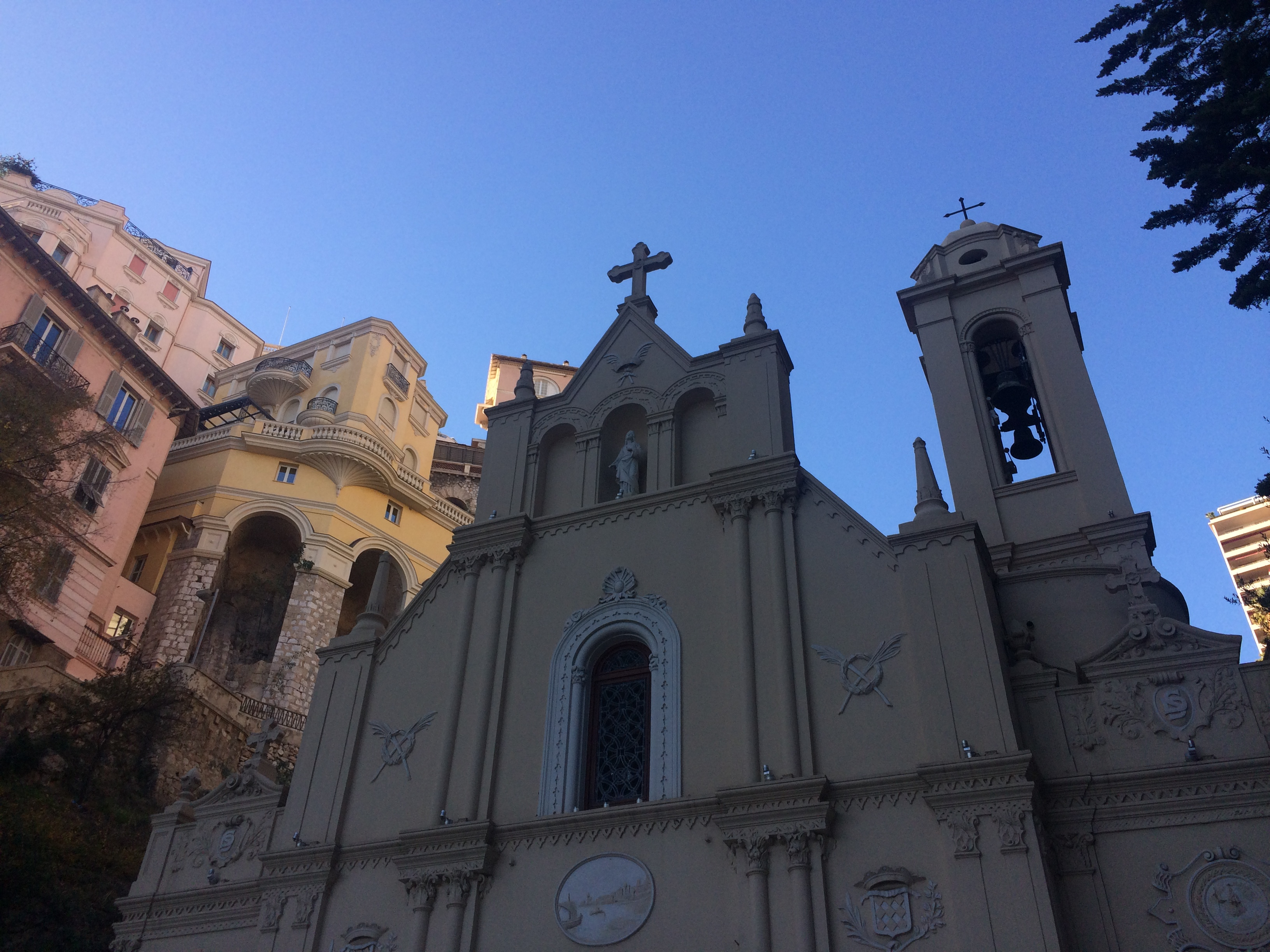 Eglise Ste Dévote de Monaco